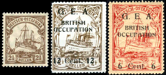 Почтовая марка Германской Восточной Африки 1905 года и марки-пародии Великобритании.